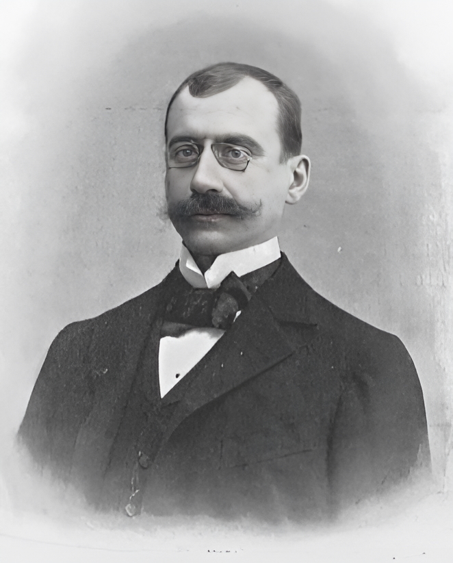 Коростовец, Иван Яковлевич